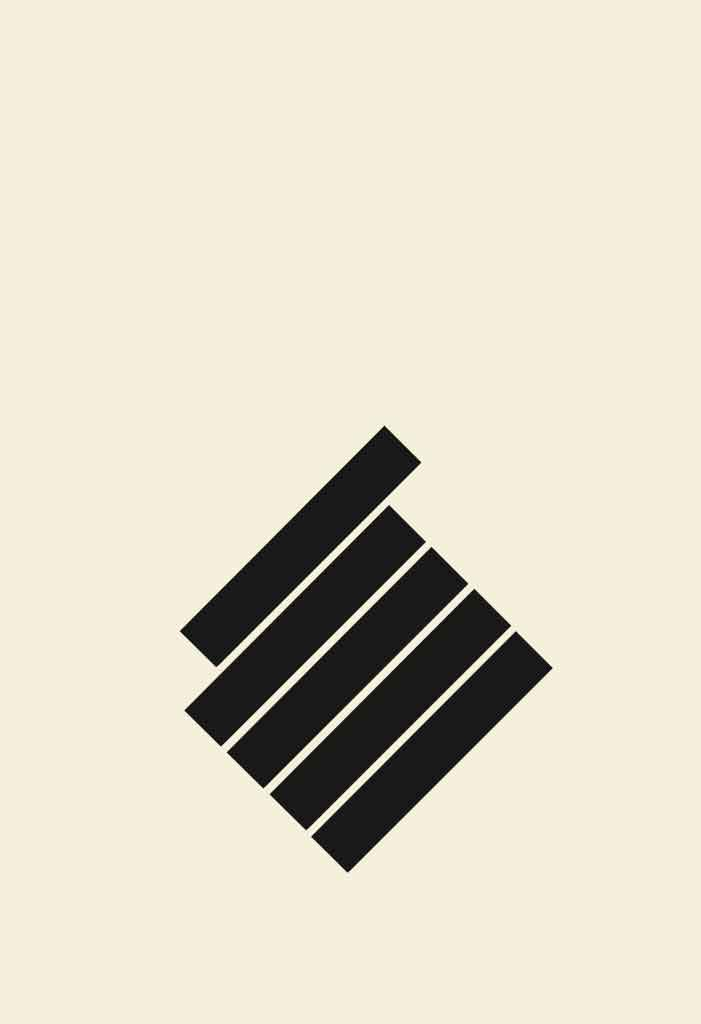 Cinci benzi 1971, ulei pe hârtie, 100x70cm